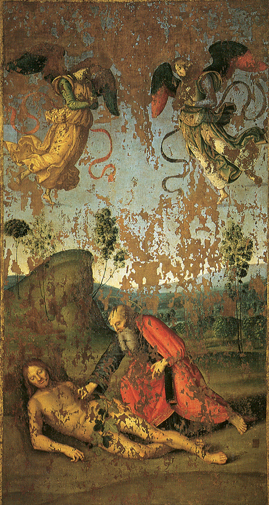 A Criação de Eva da Costela de Adão, c. 1499/1500. Óleo sobre tela, 166 x 94 cm. Verso de estandarte processional. Pinacoteca Comunale, Città di Castello, Itália